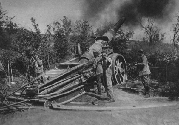 17 cm SK L/40 als Feldgeschütz bei Feuern